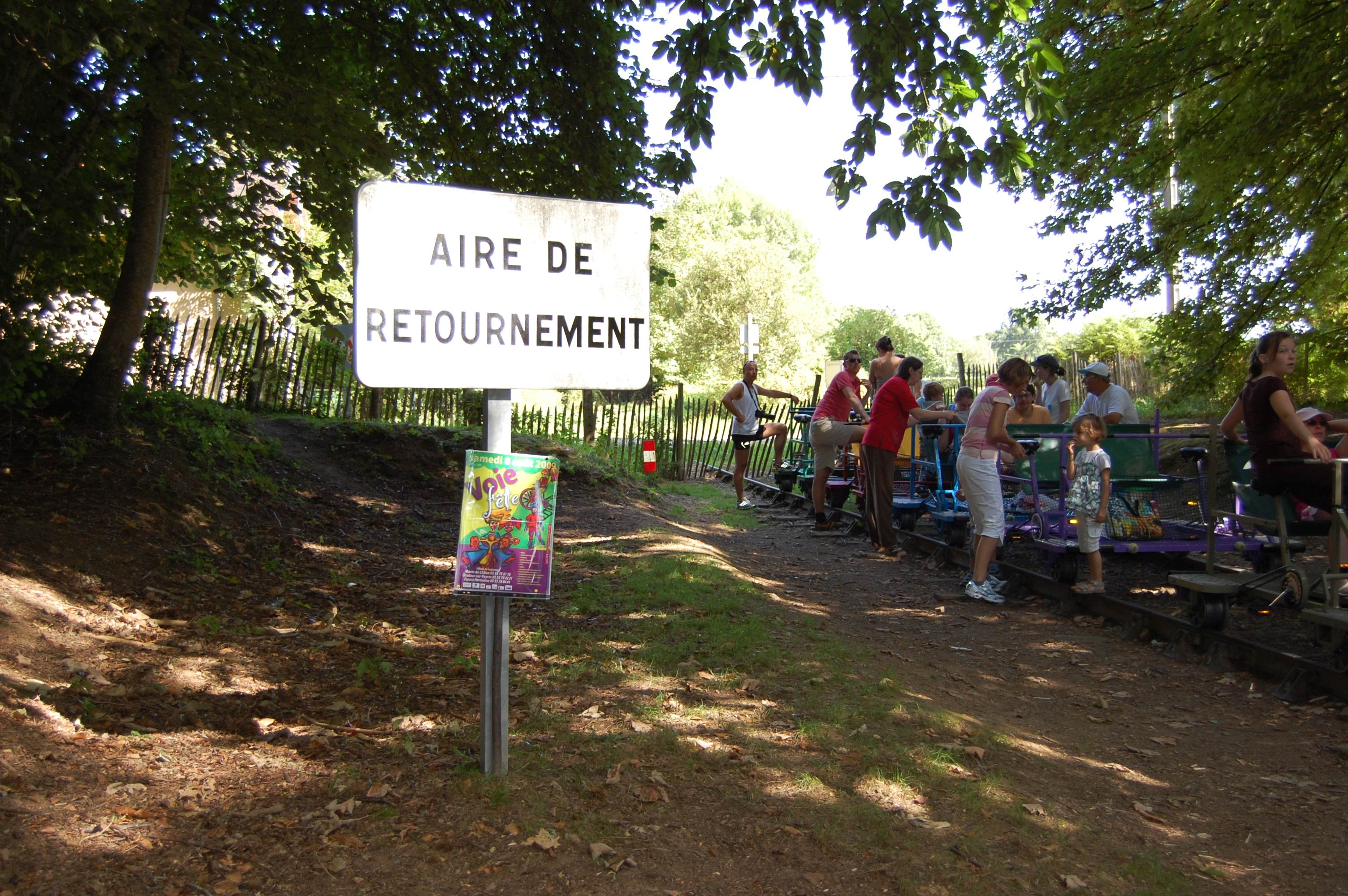 Châlus, aire de retournement du vélo-rail à la Tranchardie